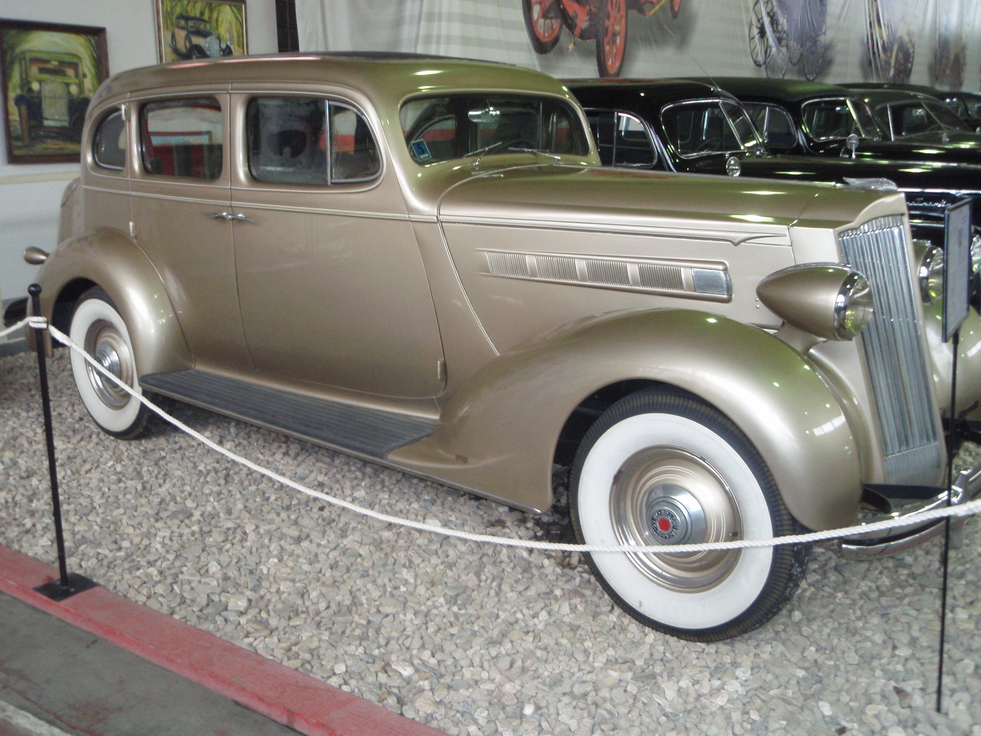 Автомобиль Packard 120 touring sedan